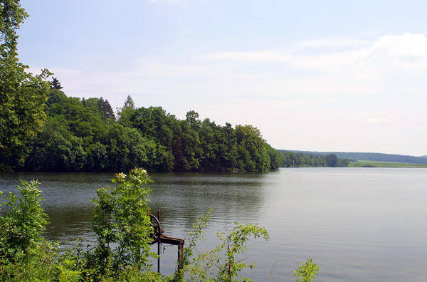 Česky: Východní okraj Merklínského rybníku od hráze.